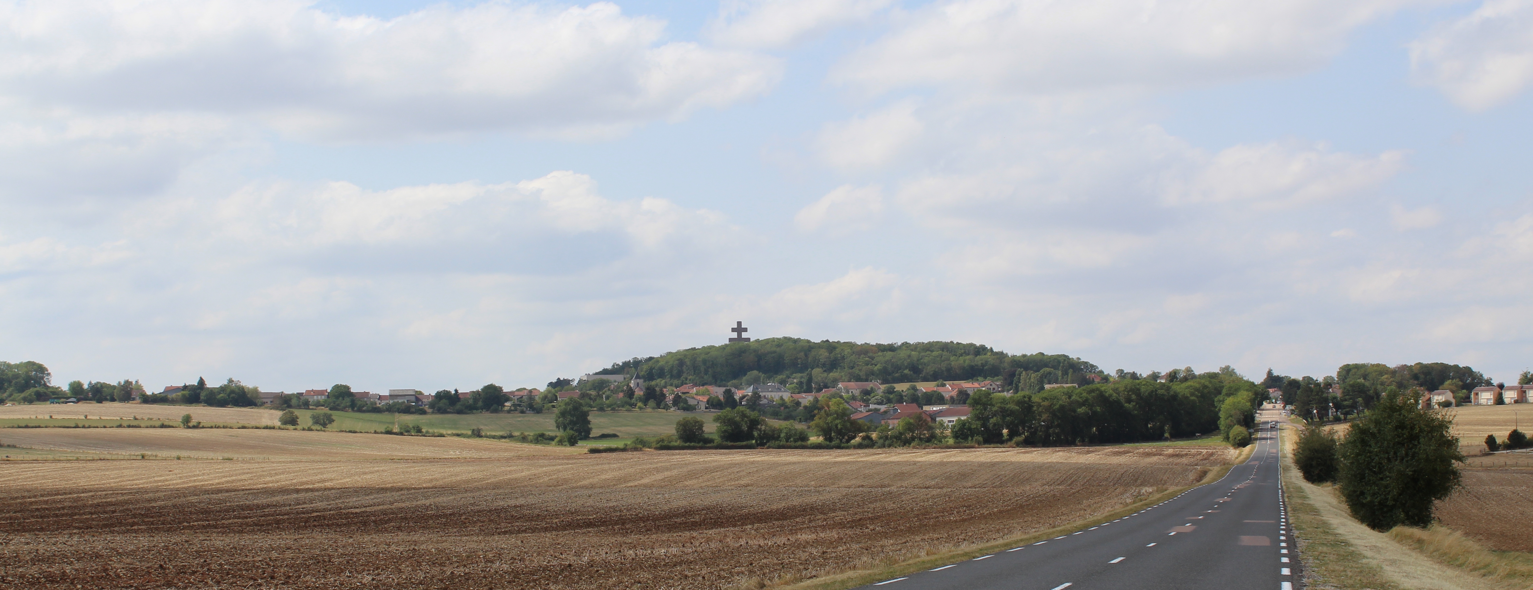 Panorama du village